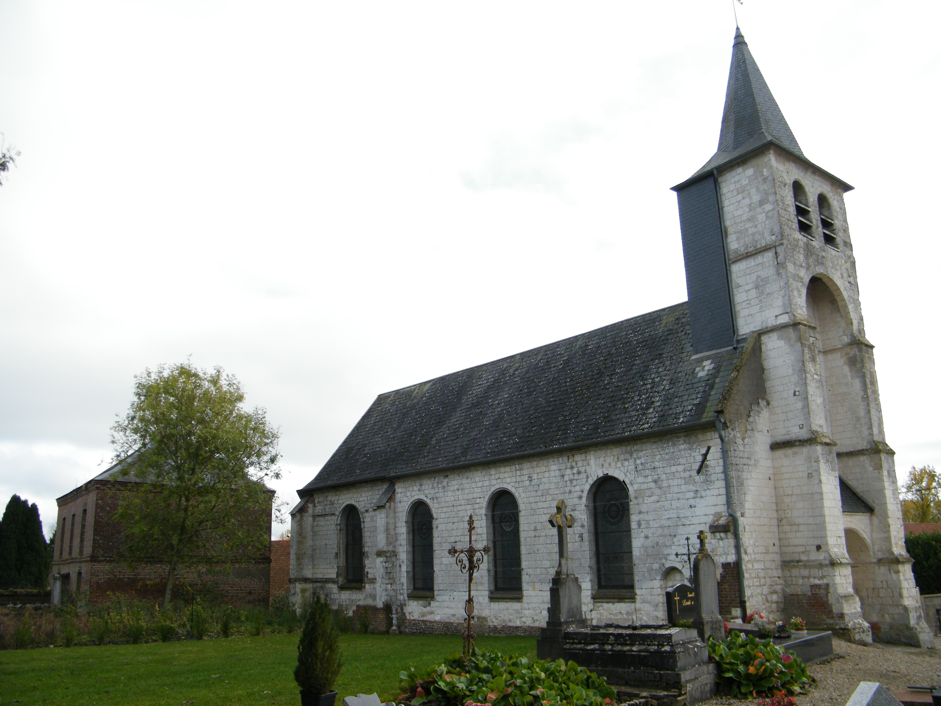 Maison-Roland, Somme, église (3)